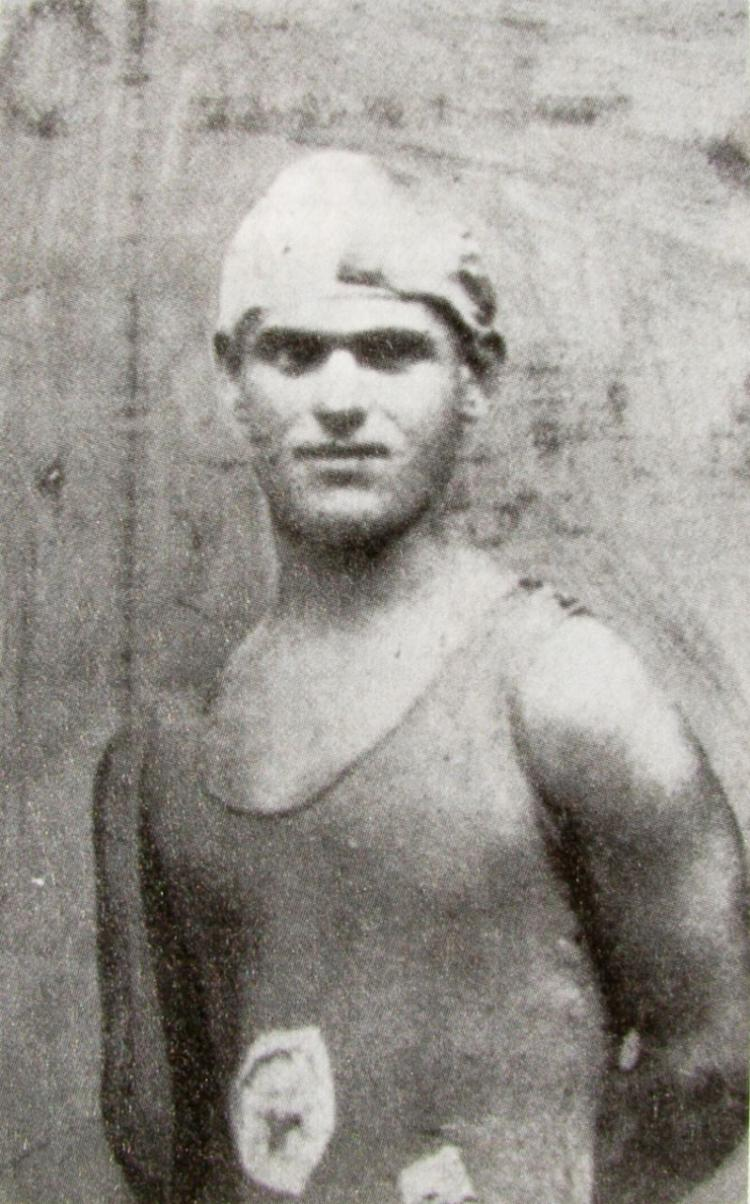 Manuel Gonçalves Preto, nadador do Club Sport Marítimo. 1940. Colecção Club Sport Marítimo.